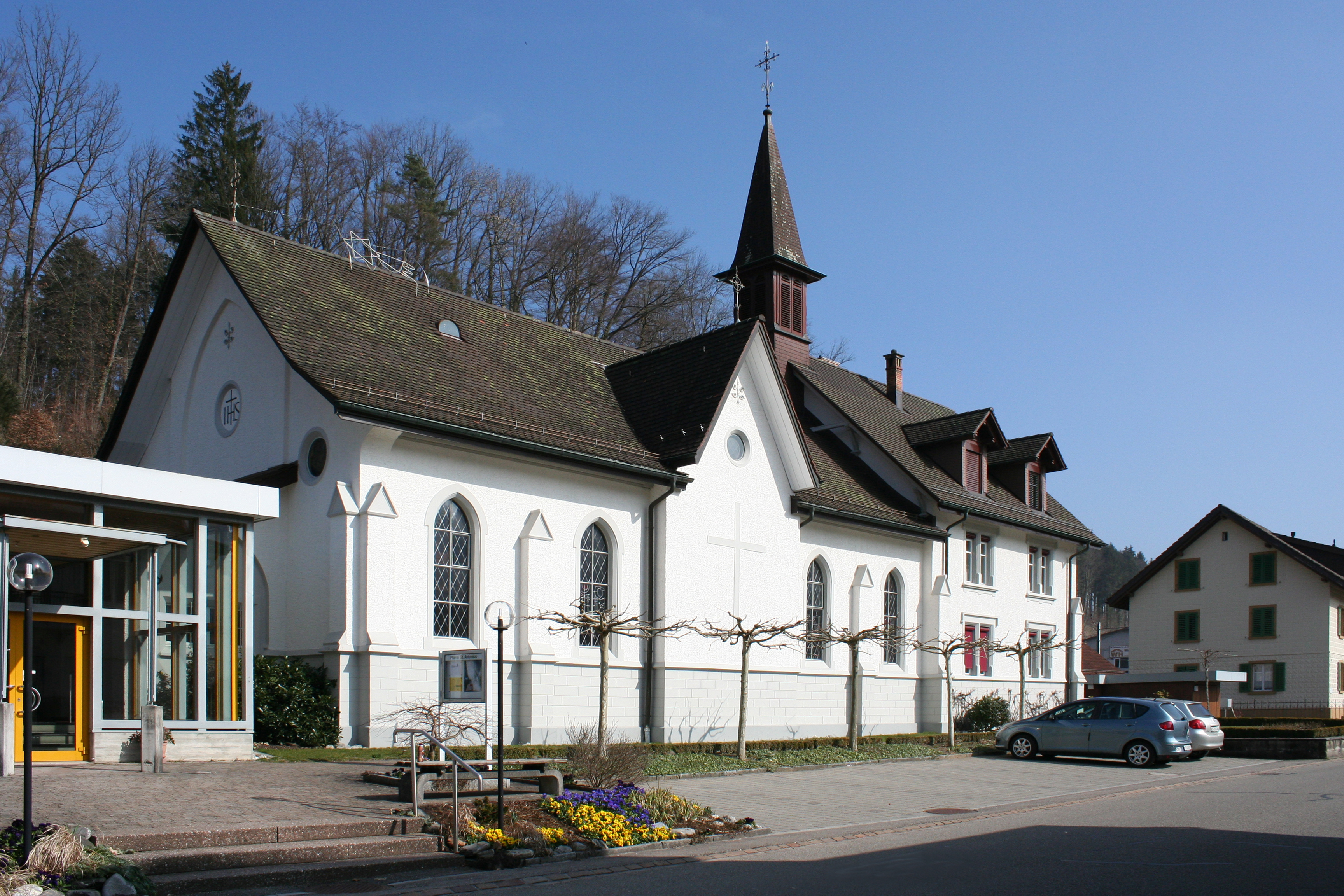 Römisch-katholische Pfarrkirche St. Antonius Kollbrunn, Ansicht von Nordwesten